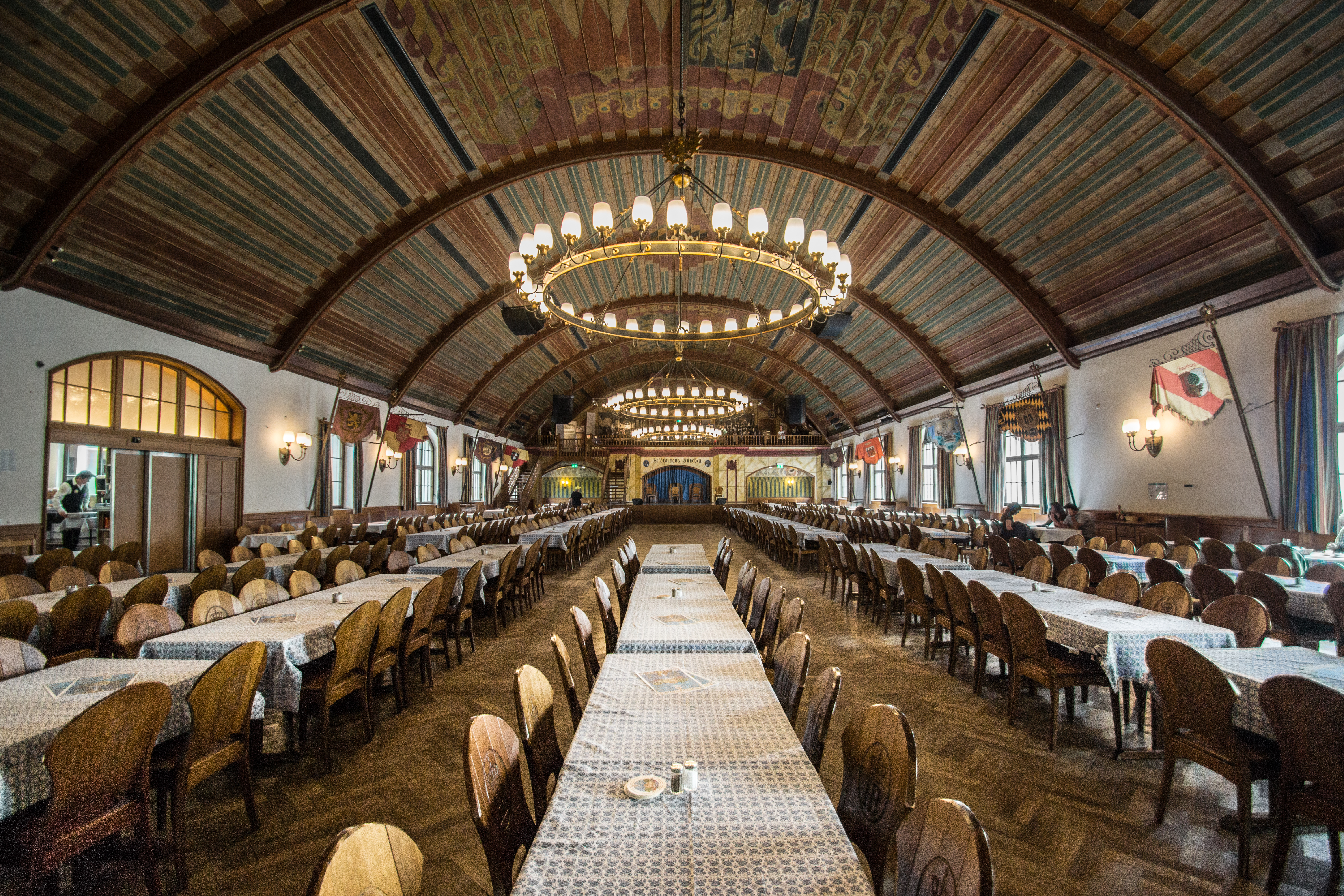 Sala Alta de la Cerveceria Hofbräuhaus